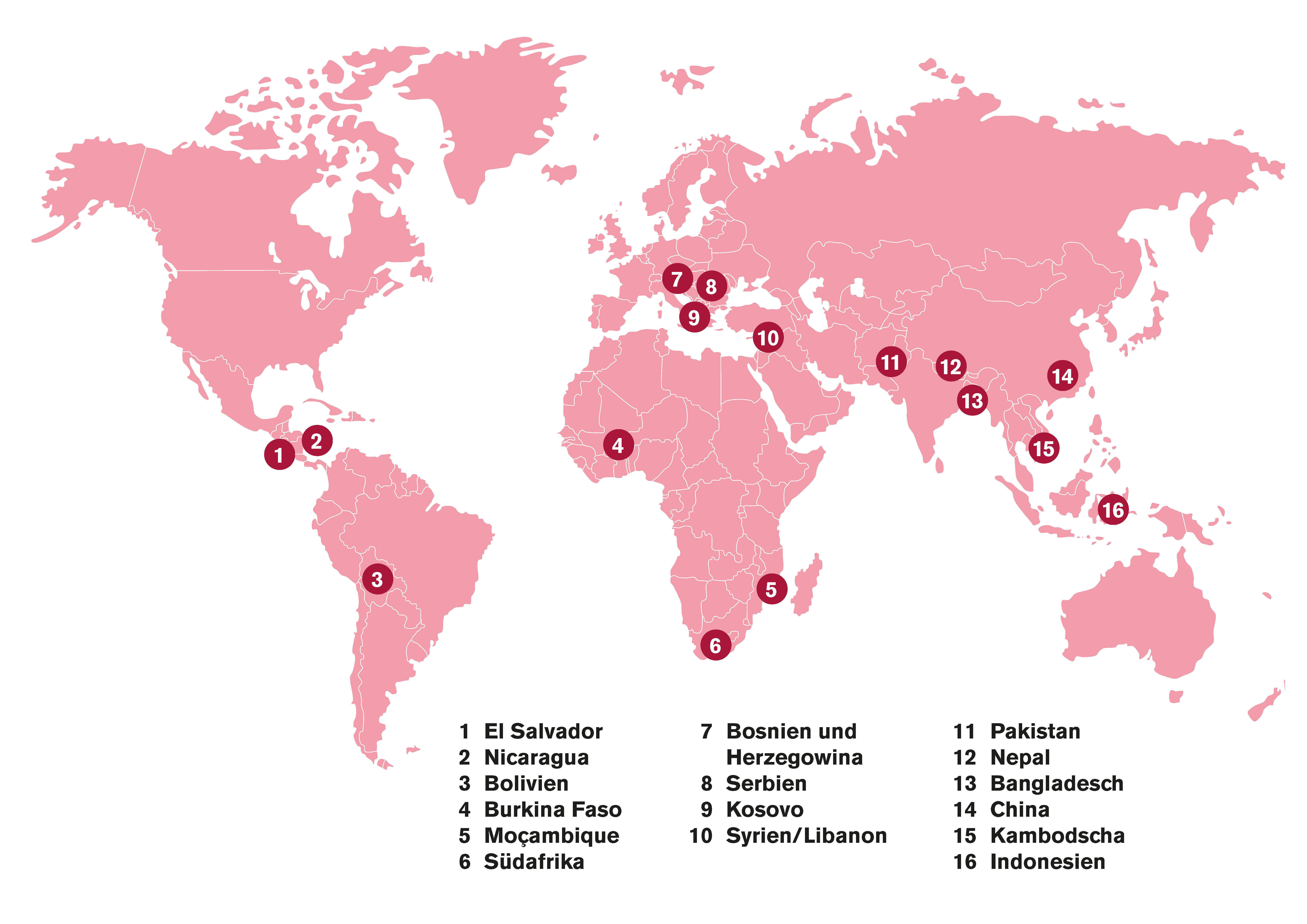 Länder, wo Solidar Suisse aktiv ist.